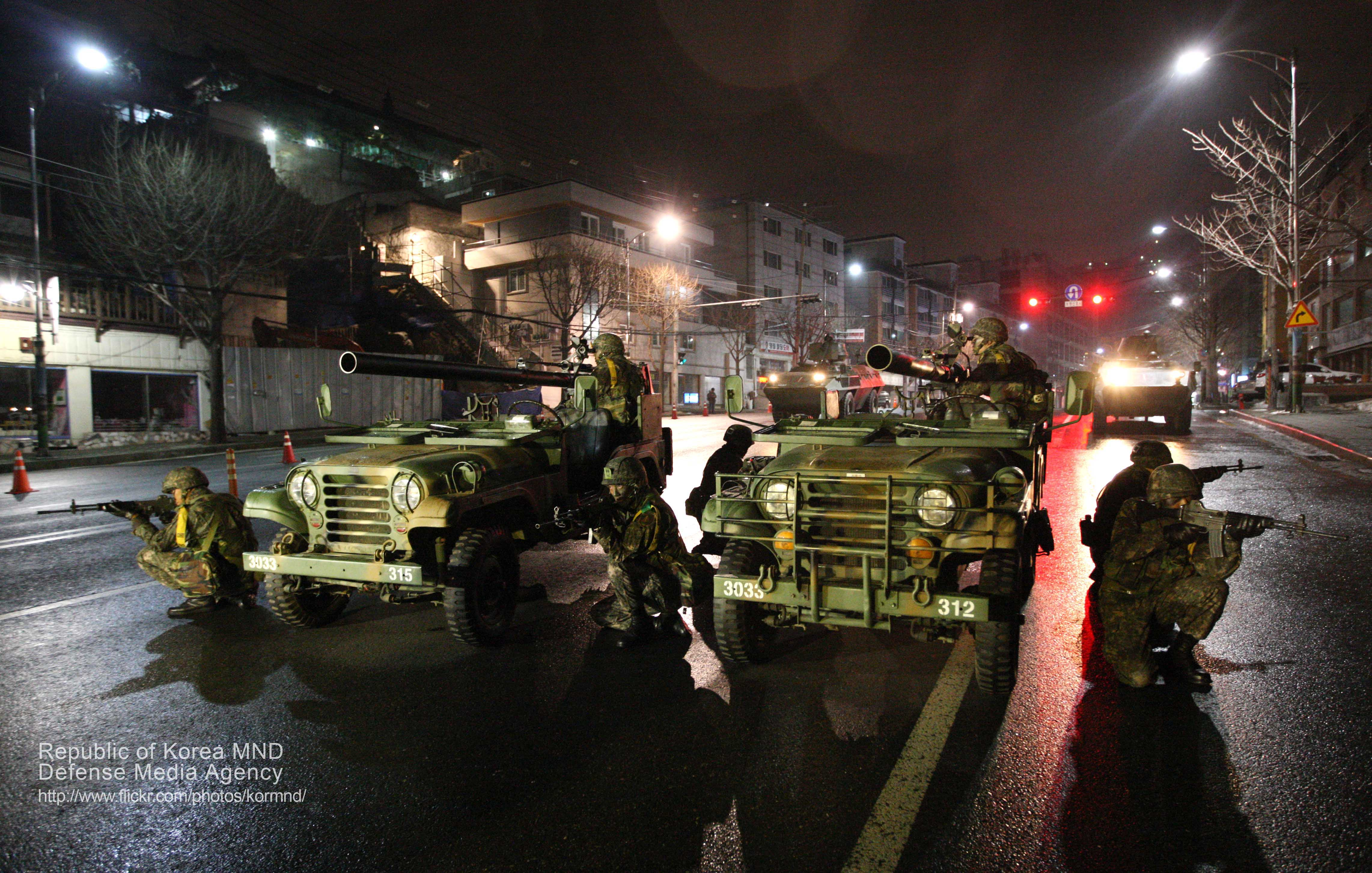 육군 수도방위사령부 장병들이 21일 새벽 서울 세검정 일대에서 예상 가능한 북한군의 각종 도발 상황을 상정한 'Remember 1.21훈련'을 벌이고 있다. 촬영 - 정의훈 기자